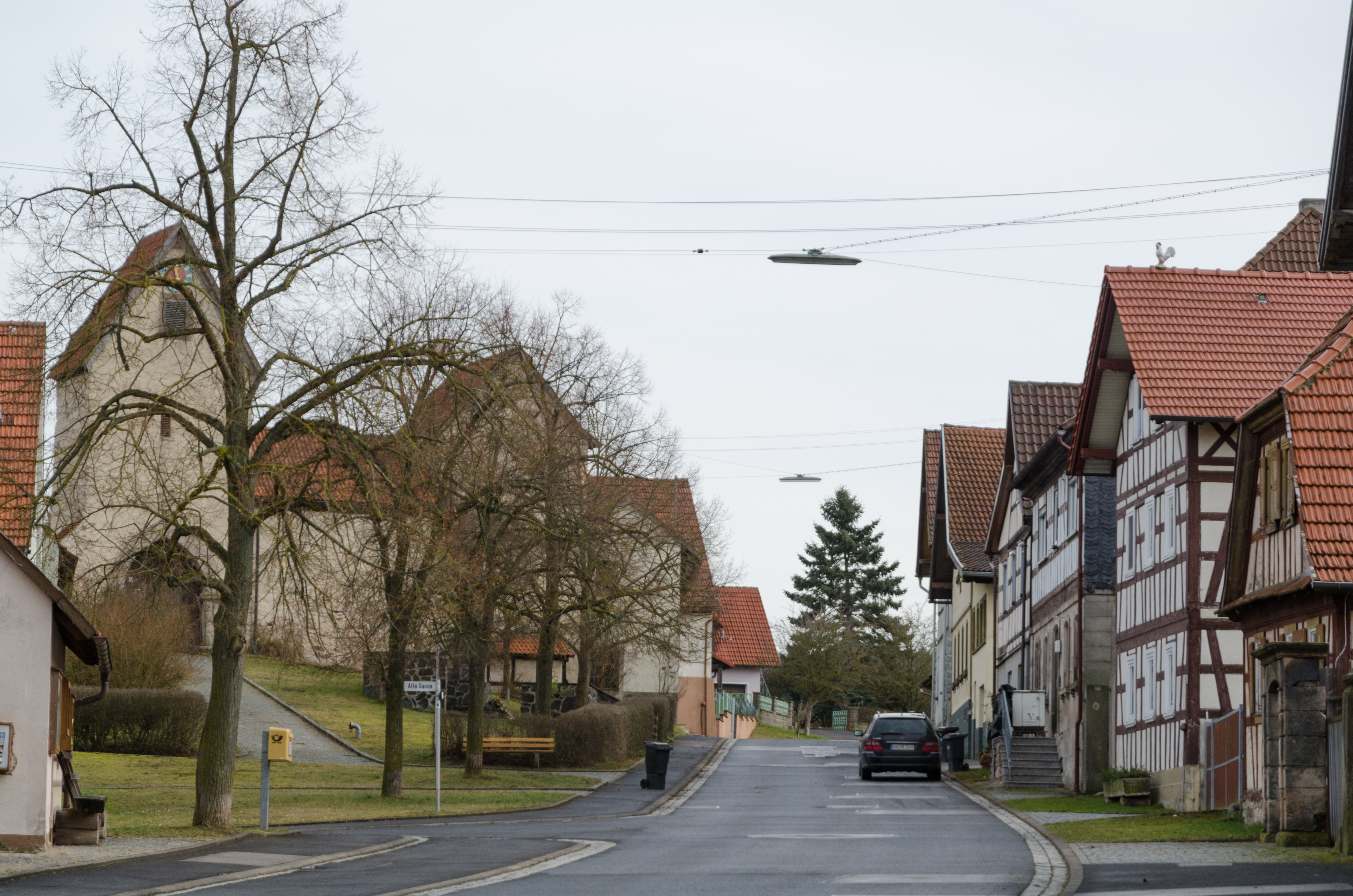 Sulzdorf an der Lederhecke, Serrfeld, Kirchenburg, West-Ost-Richtung